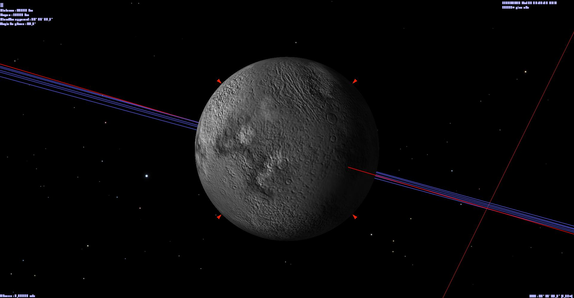 Kepler-11b vu dans Celestia